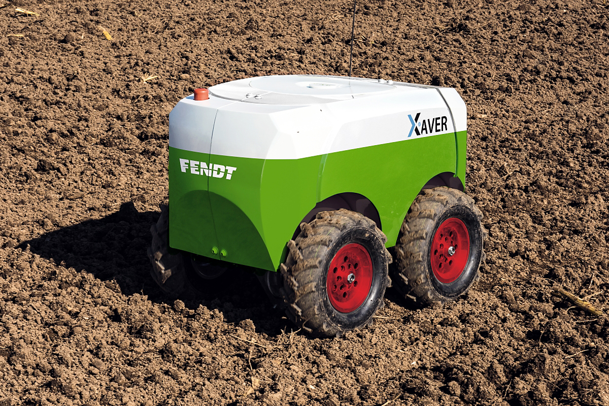 Fendt Xaver Robotereinheit